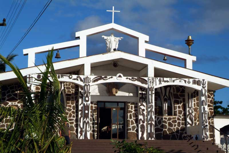 Isla de Pascua This is a photo of a national monument in Chile: 628